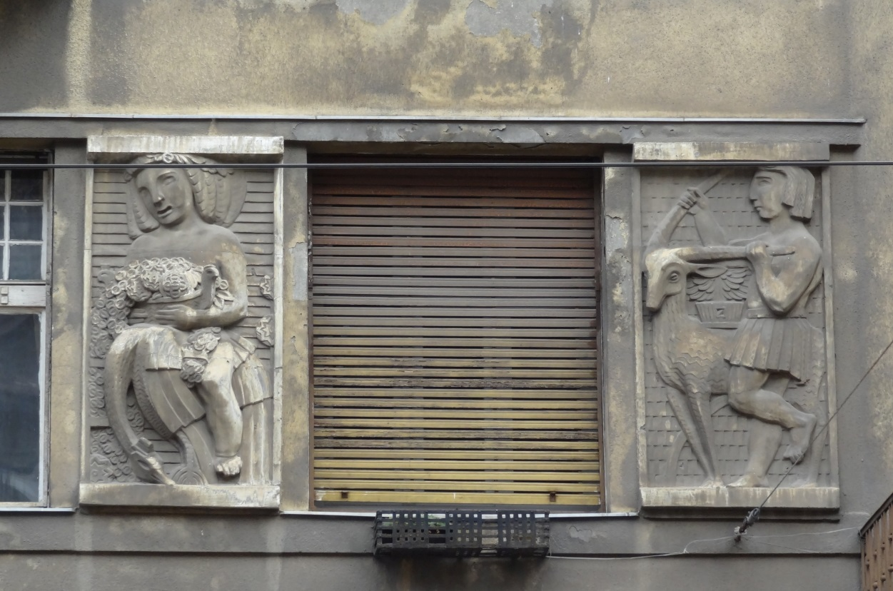 Budapest, Népszínház utca 37. – Ornamentika ablak mellett 1 2017